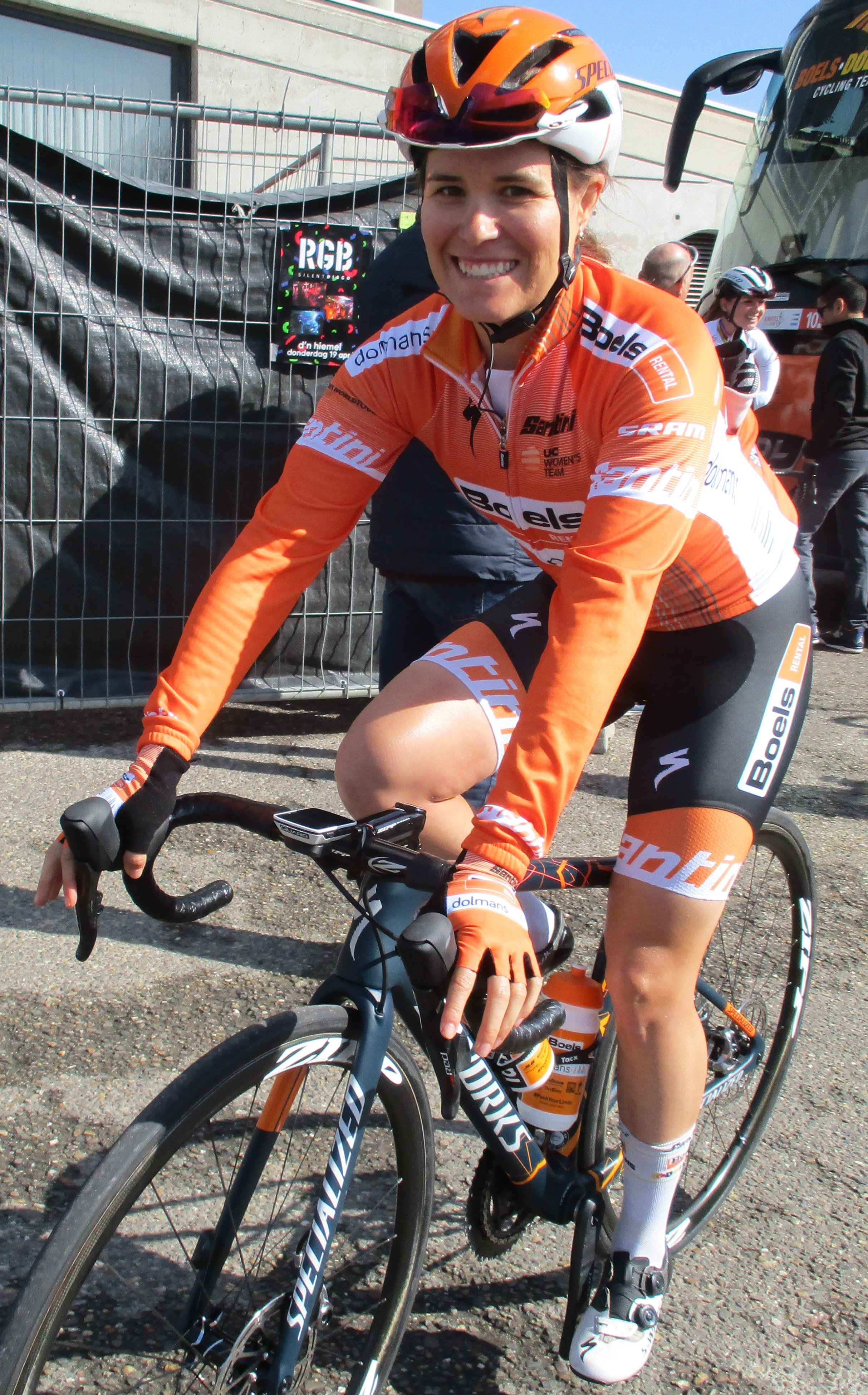 Start van de Amstel Gold Race Ladies Edition 2018 in Maastricht.